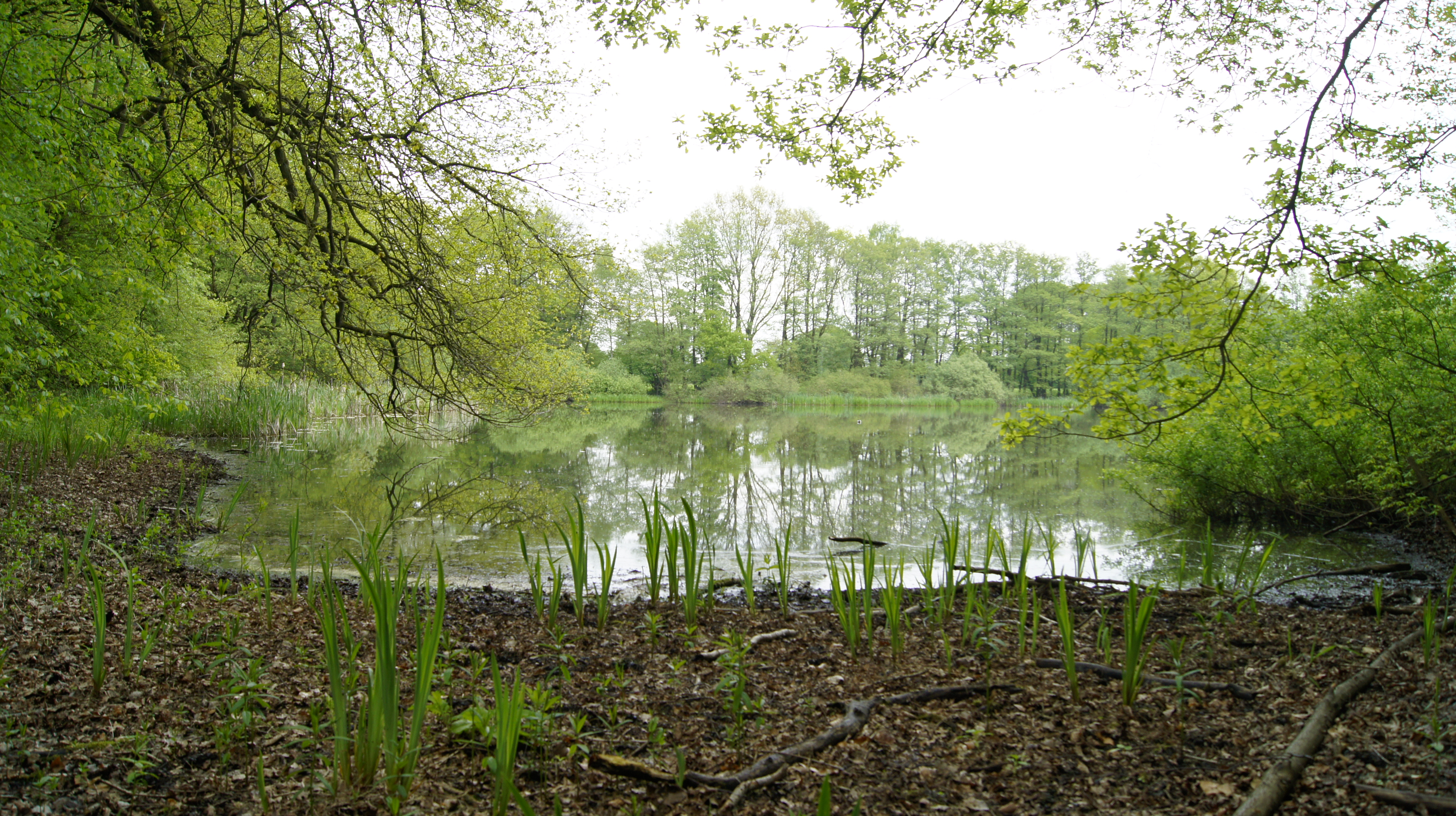 Das Ufer eines Teiches bei Hoisdorf im Naturschutzgebiet „Hoisdorfer Teiche“.